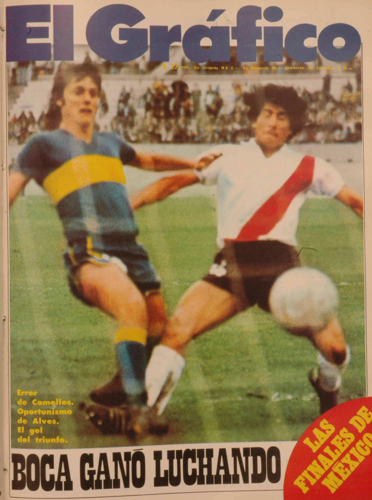 El Grafico del 29 de Octubre de 1975. Edicion 2925